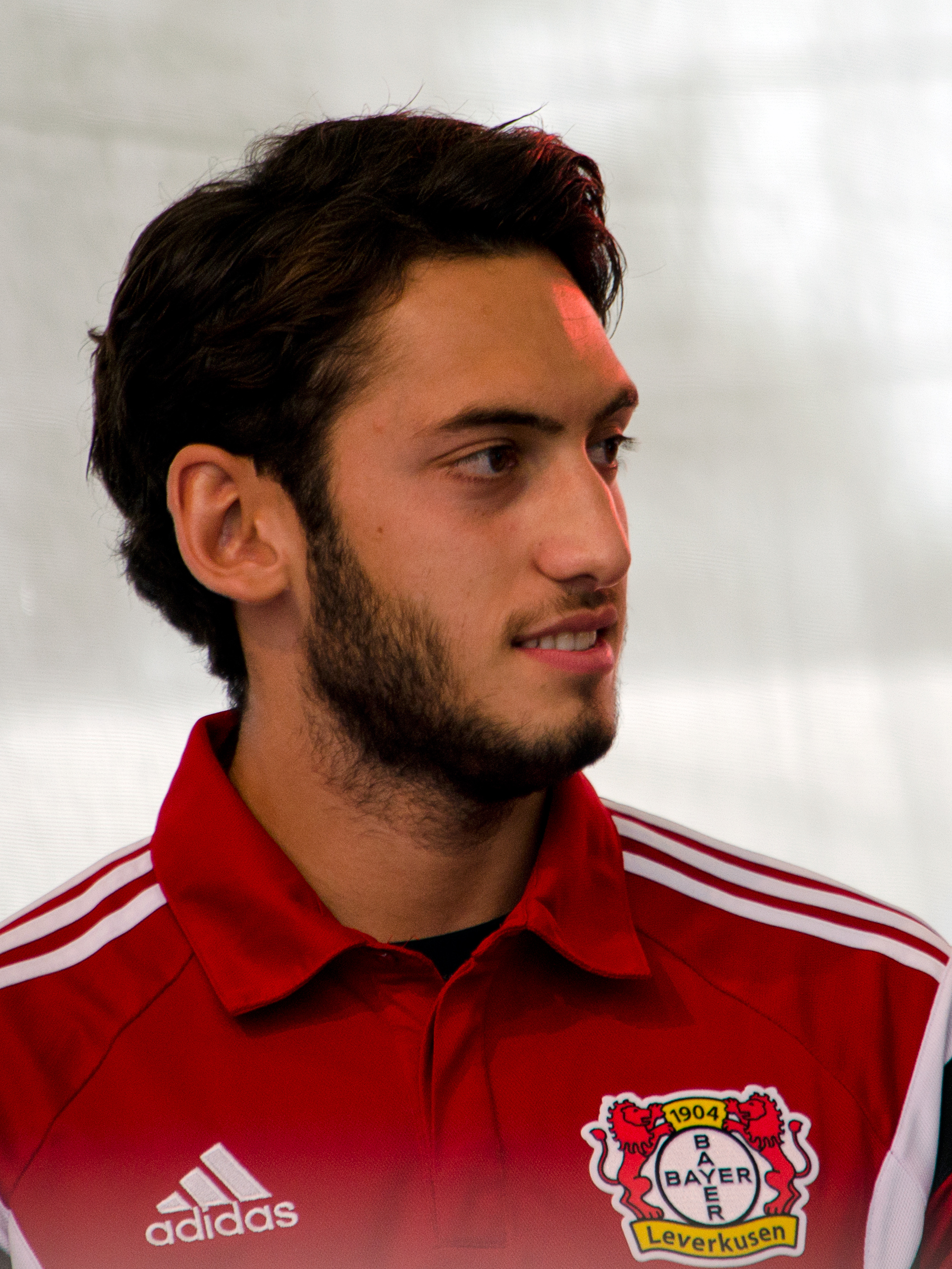 Hakan Çalhanoğlu, türkischer Fußballspieler